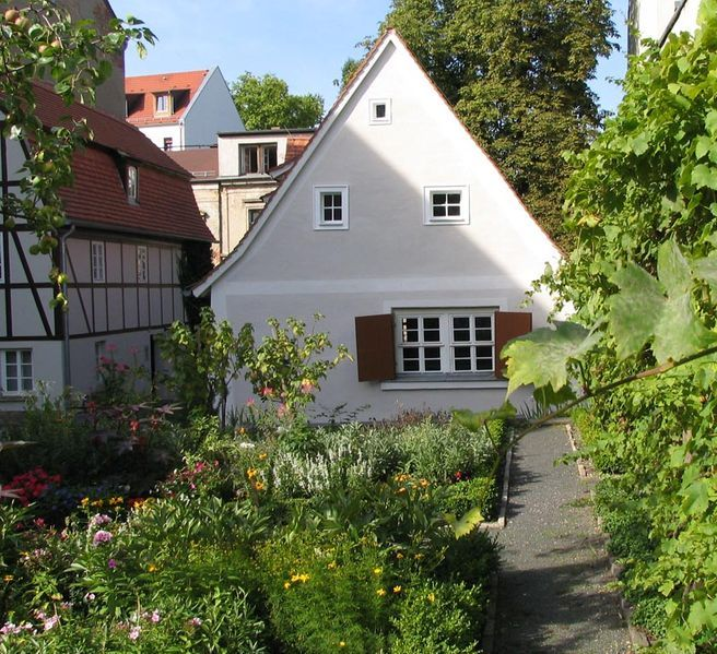 Das Schillerhaus im Leipziger Stadtteil Gohlis Source: German wikipedia Photograph: Appaloosa